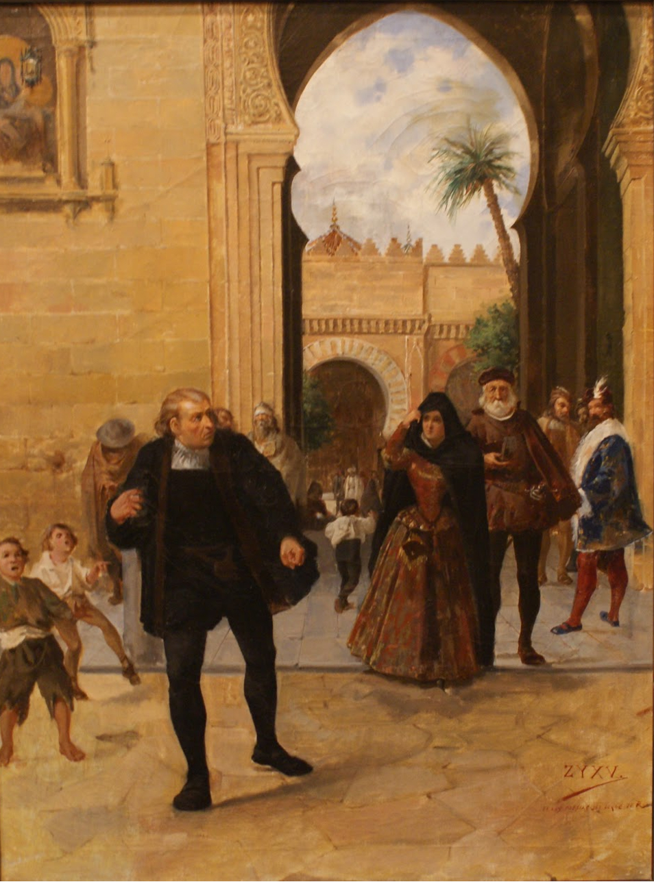 La obra representa al célebre almirante Cristóbal Colón († 1506), saliendo de la Mezquita-catedral de Córdoba.